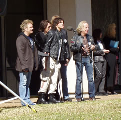 Aerosmith (2007).